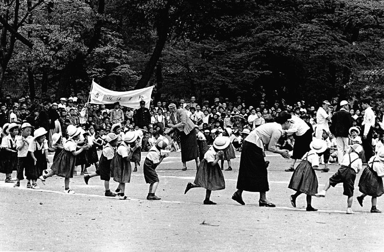 촬영일 : 1954년 05월 05일 촬영장소 : 대한민국 서울 창경궁 참석자 : 미상 관련내용 : 어린이들이 창경궁에서 흥겨운 놀이를 하고 있다.